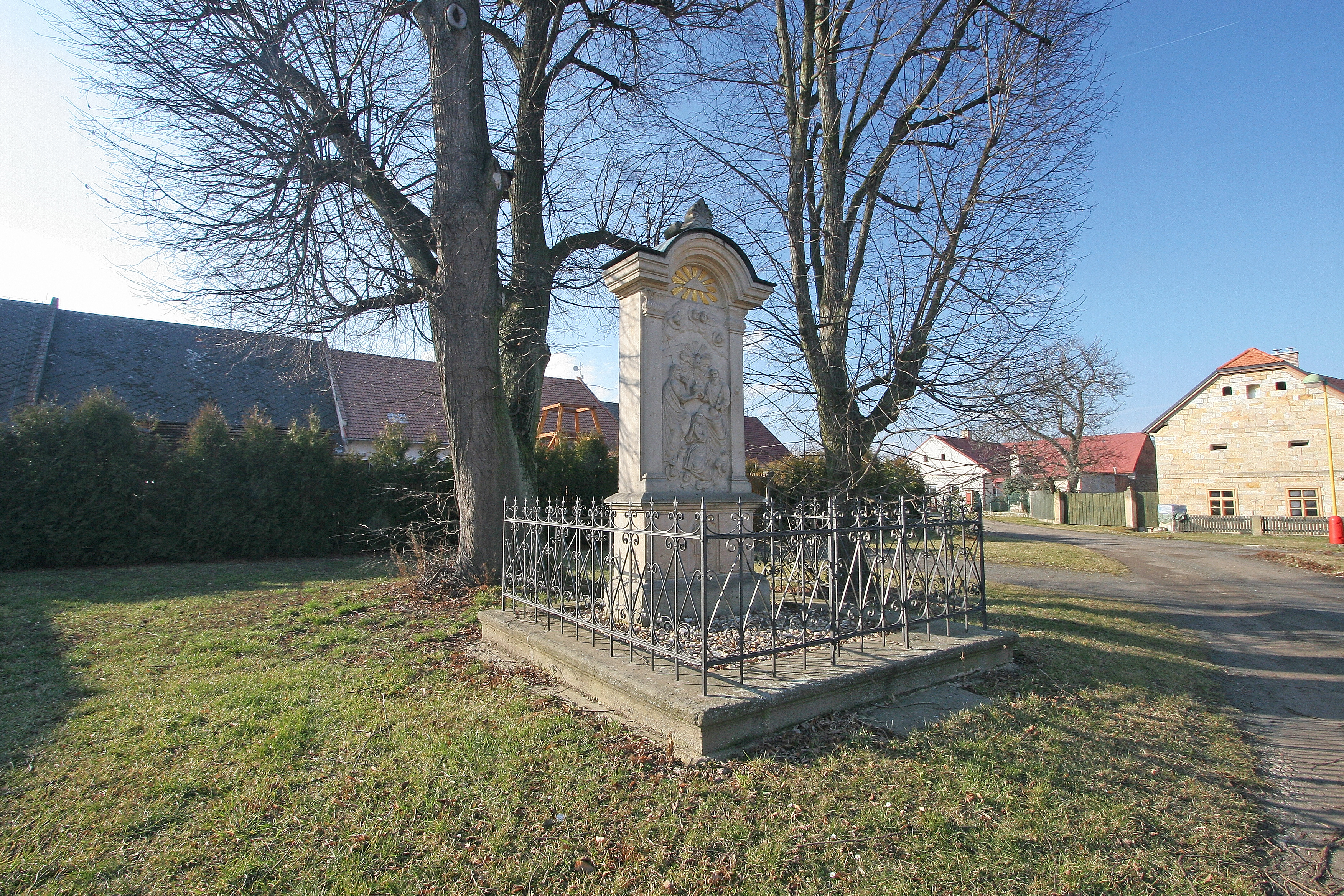 Socha - reliéf Nejsvětější Trojice (Velké Bílsko), náves, Velké Bílsko